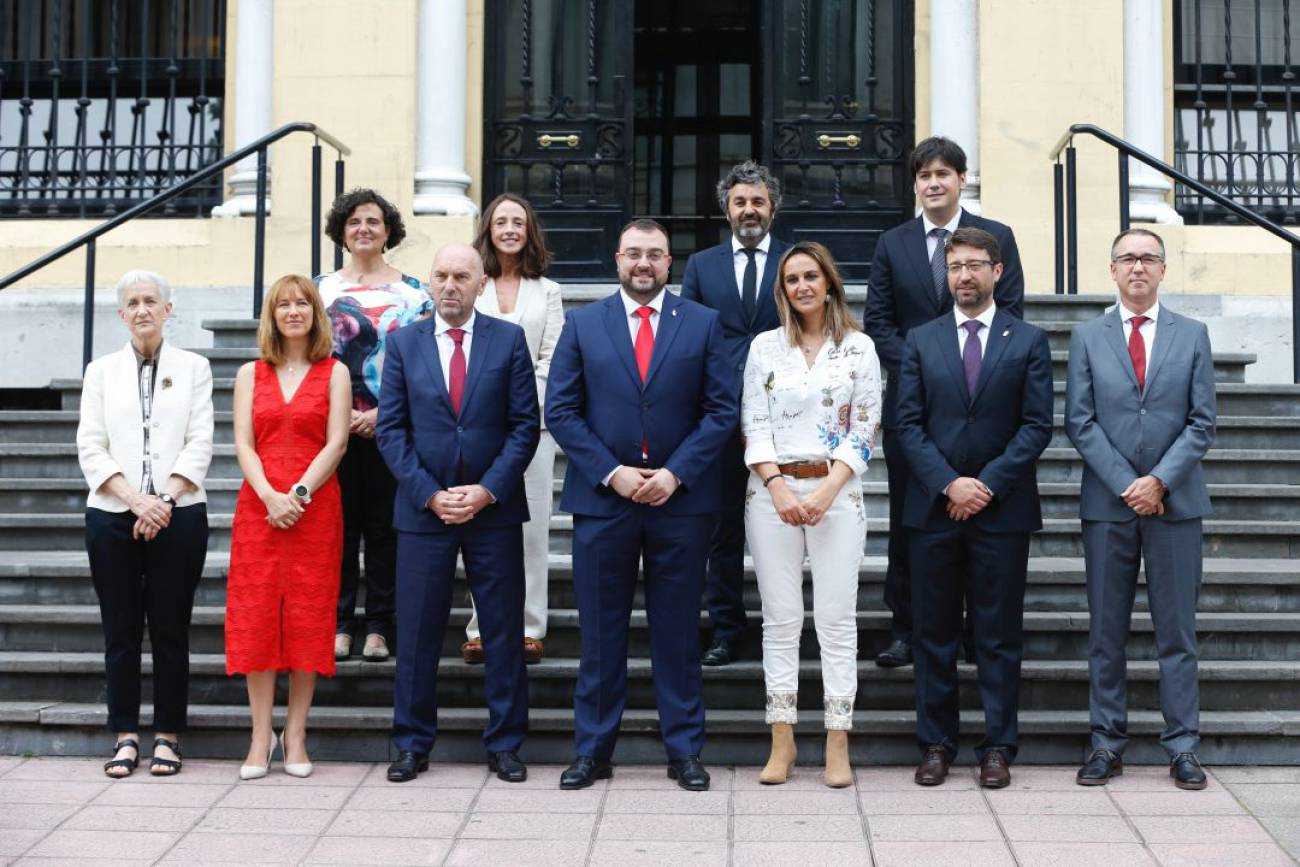 Presidente de Asturias, Adrián Barbón, junto a sus consejeros frente a la puerta de la Presidencia del Gobierno (Oviedo, Asturias)